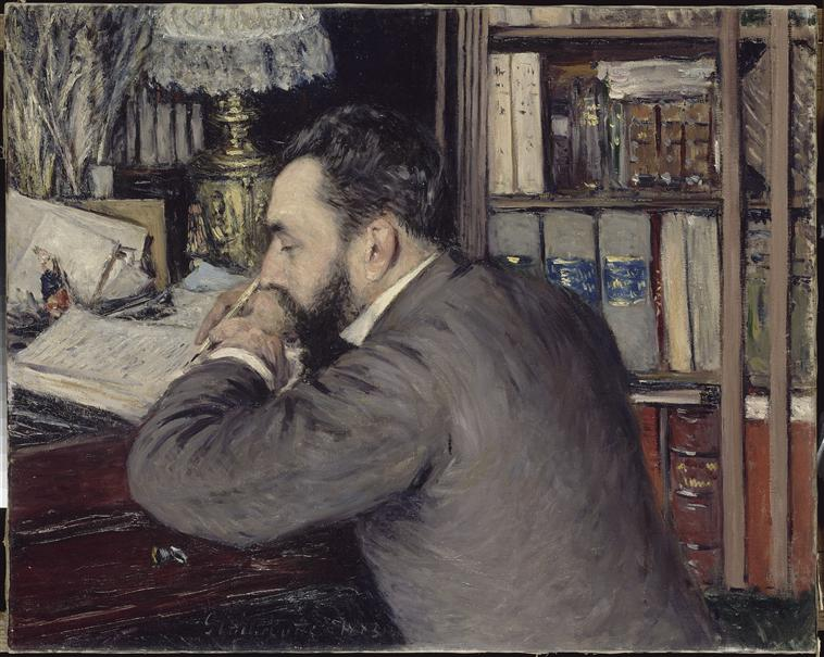 Henri Cordier (1849-1925), französischer Orientalist